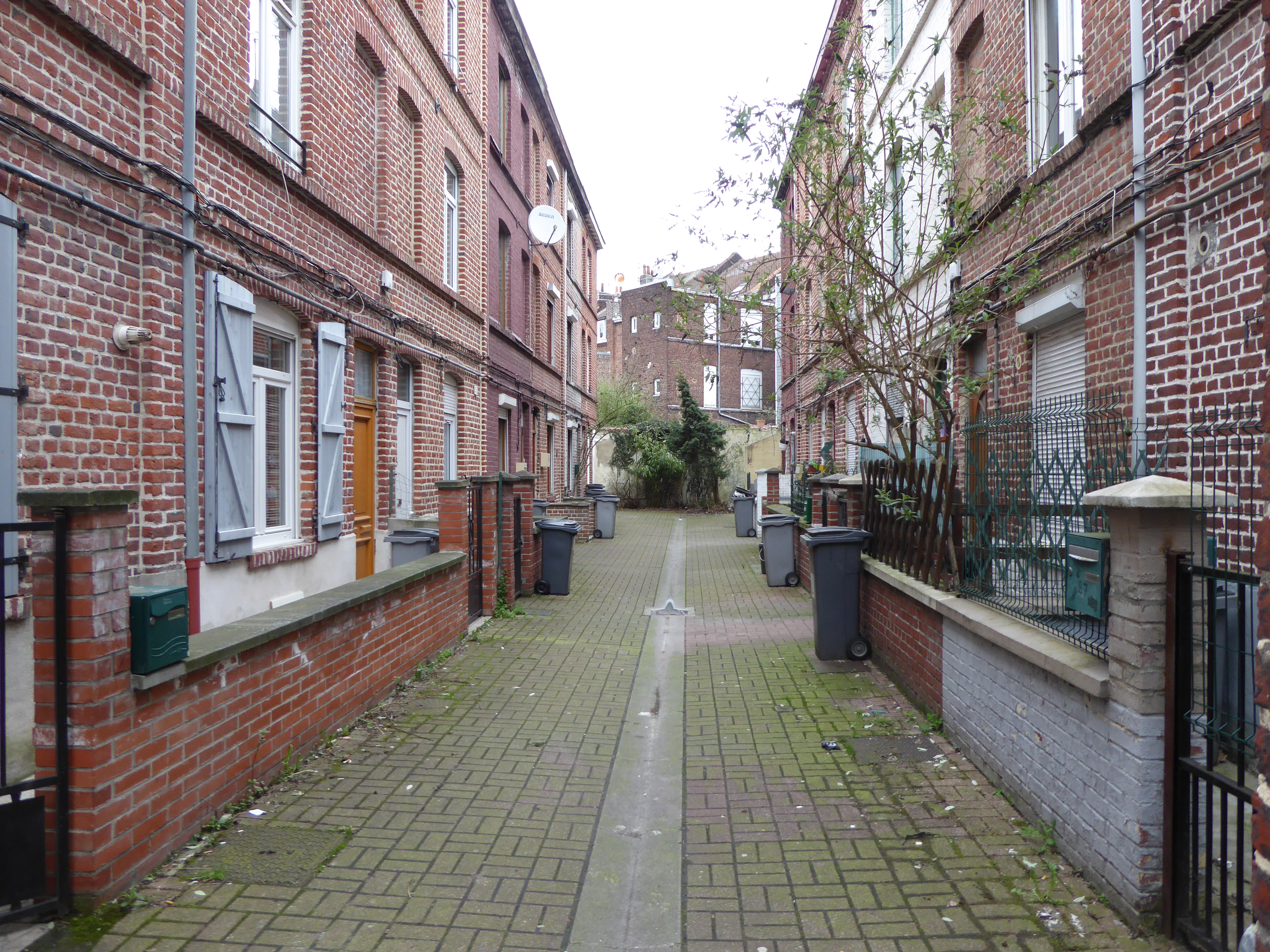 Cour à Moulins